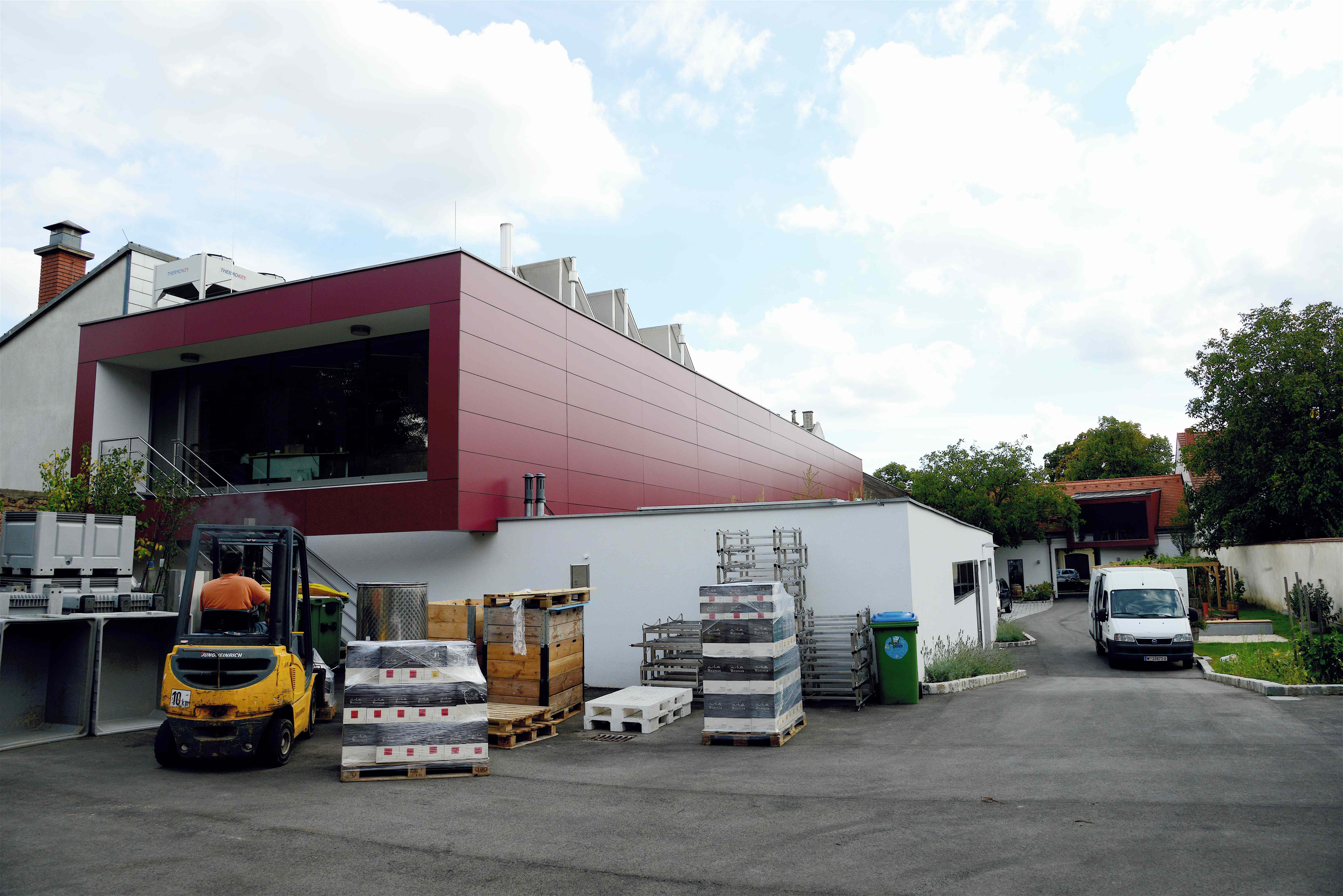 Weingut Wieninger, Wien, Stammersdorfer Straße 31, September 2013